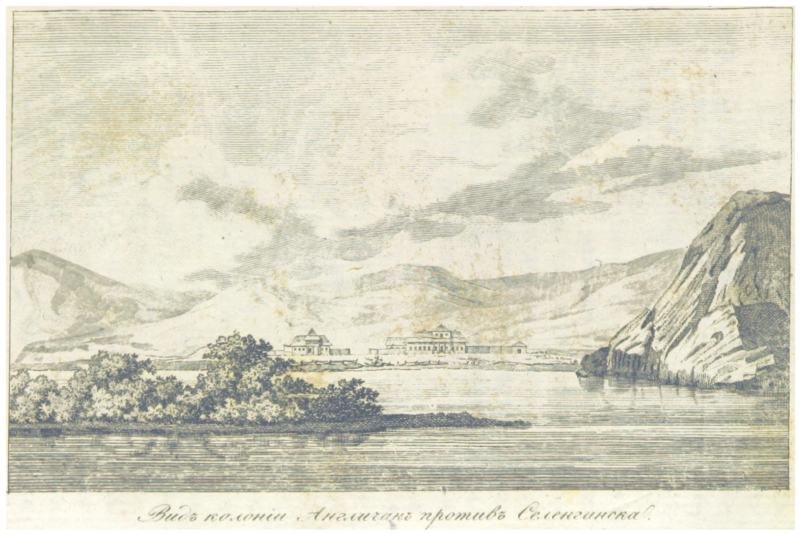 Die anglikanische Missionsstation am Ufer der Selenga bei Selenginsk (gegründet 1817 von der Londoner Missionsgesellschaft)